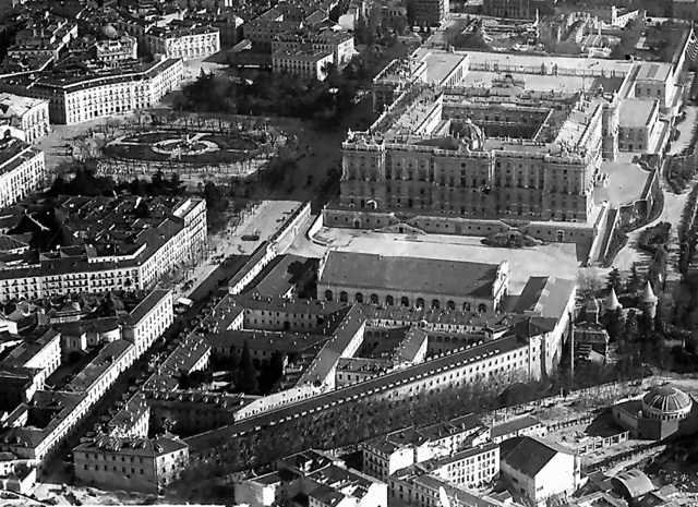 Reales Caballerizas y el Palacio Real de Madrid (circa 1920-1930)